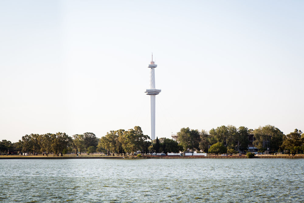 Fotos: Estrella Herrera